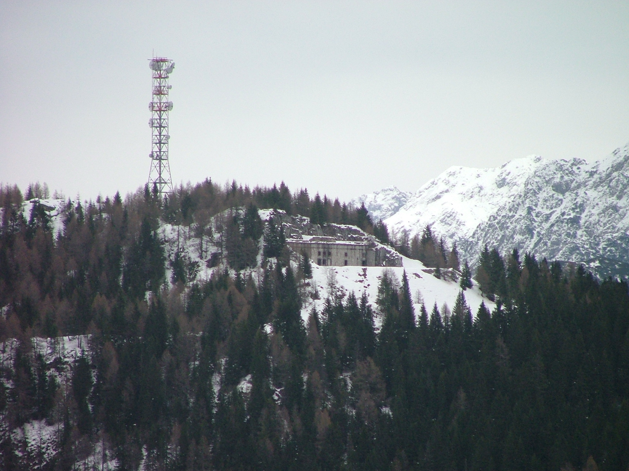 Forte Col Vidal, First World War's fortification at Pian dei Buoi, Lozzo di Cadore, Belluno, Dolomites, Veneto, Italy